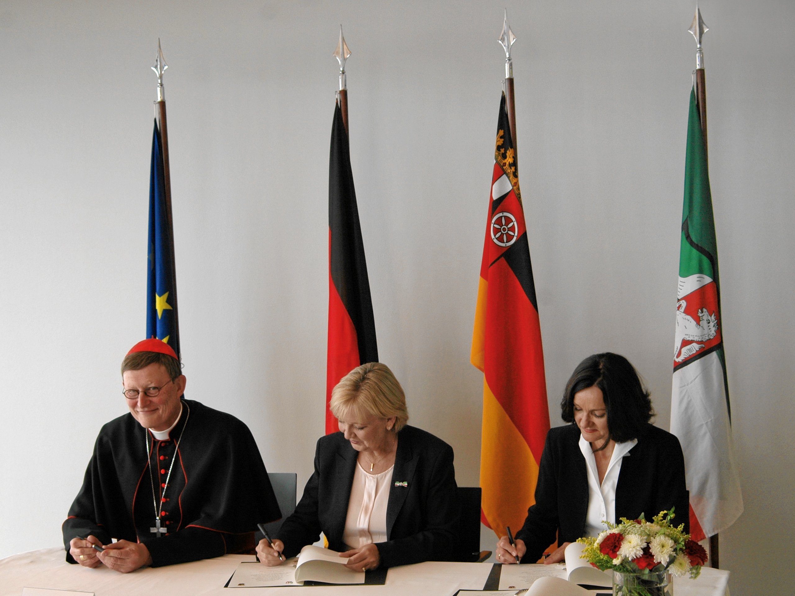 Rainer Maria Kardinal Woelki (links) legte als neuer Erzbischof von Köln den Treueeid gegenüber Staat und Land in der Staatskanzlei NRW ab. Ministerpräsidentin Hannelore Kraft (mitte) und Staatssekretärin Jacqueline Kraege (rechts) als Vertreterin des Landes Rheinland-Pfalz beurkunden die Eidesleistung.